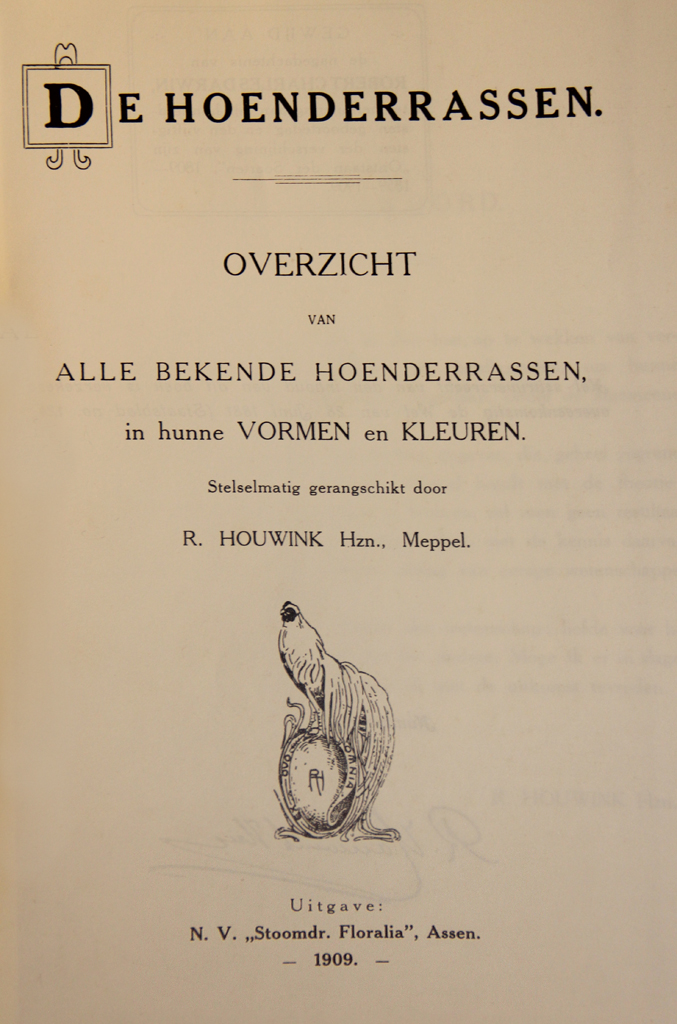 Voorblad van het boek De Hoenderrassen van Roelof Houwink